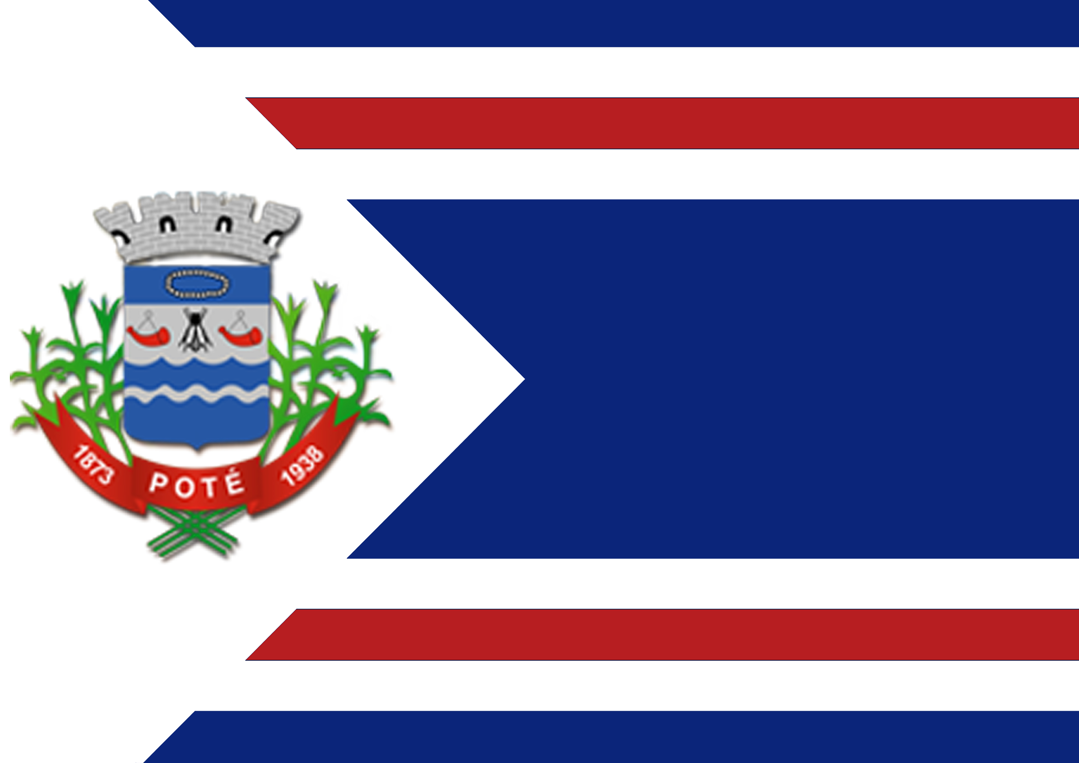 bandeira da cidade de Poté